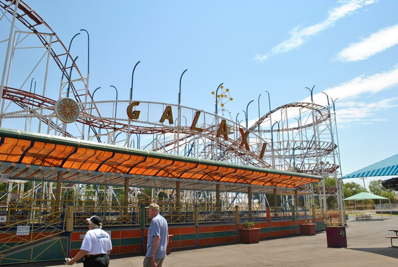 Galaxy Joyland